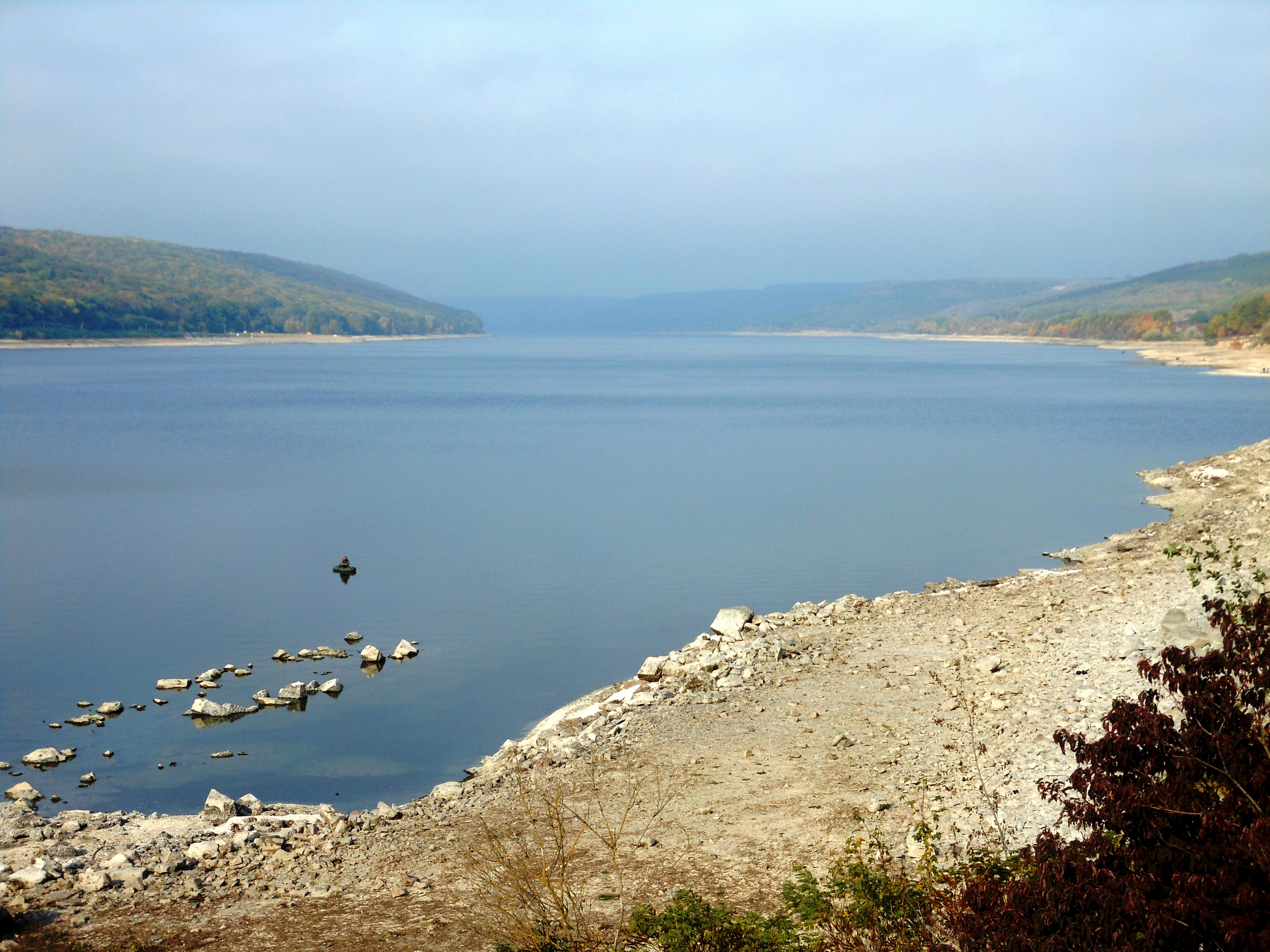 «Дністер», Муровано-Куриловецький район, с. Жван, с. Наддністрянське